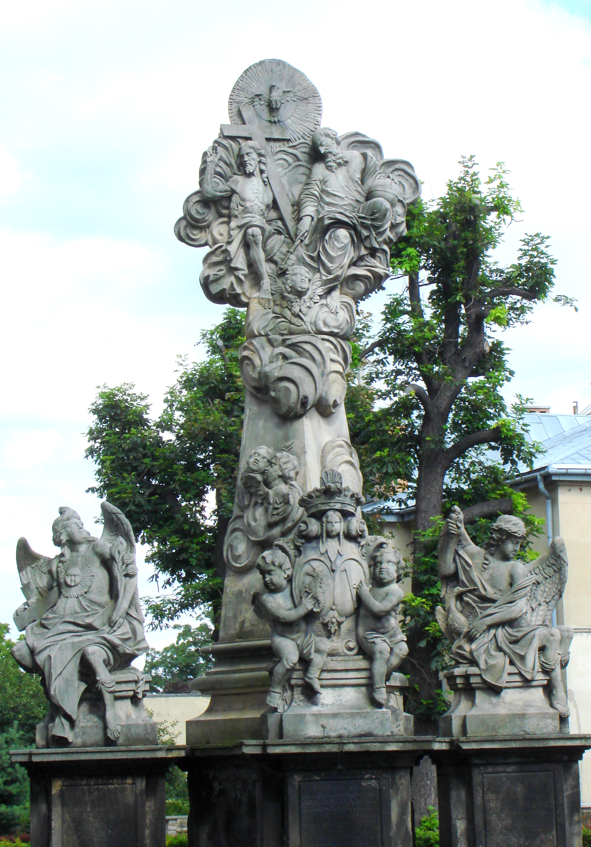 Strzegom, pomnik Trójcy Świętej przed bazyliką śś Piotra i Pawła